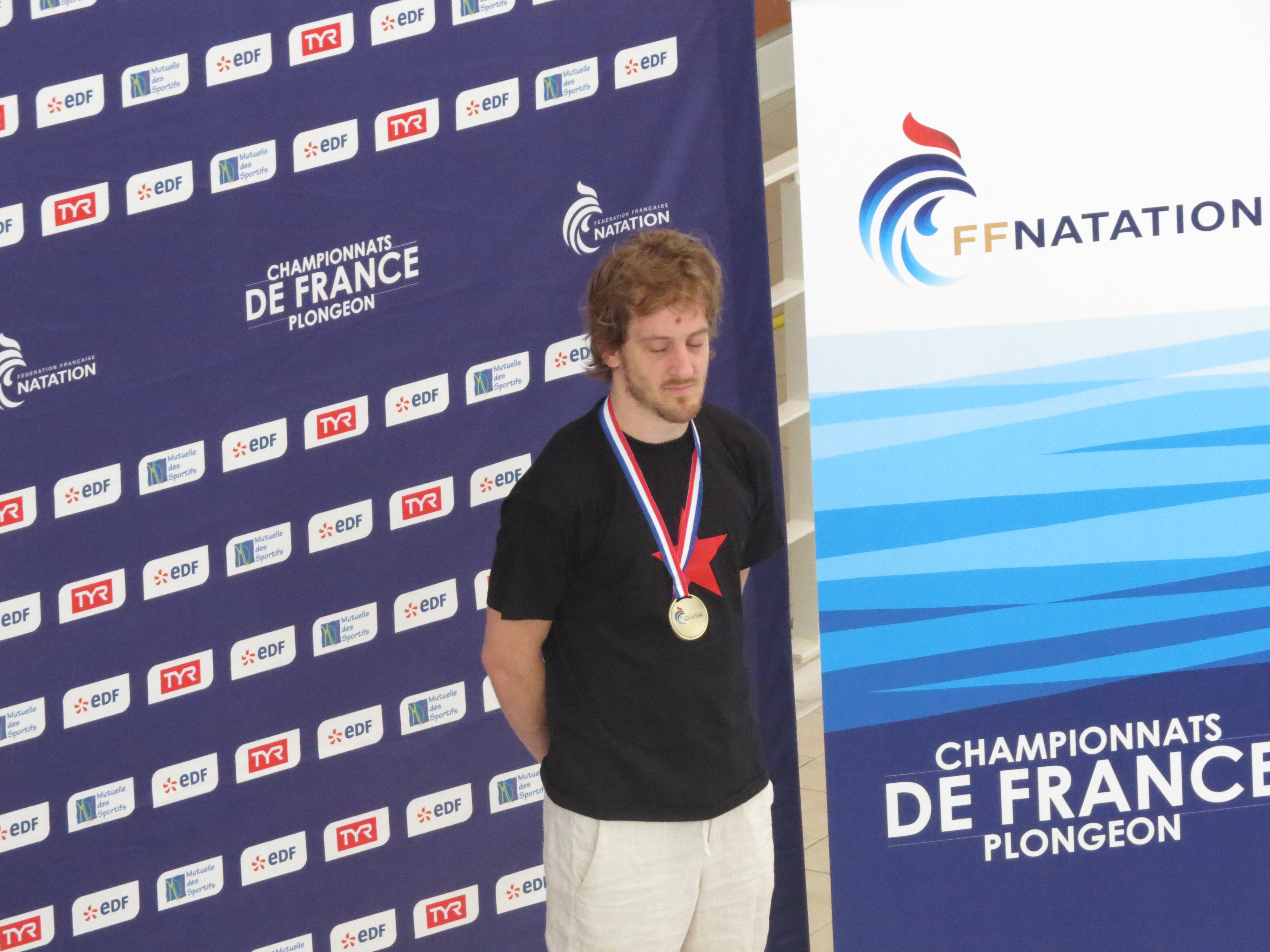 Championnats de France de plongeon (haut vol à 10m) 2019 à Montreuil